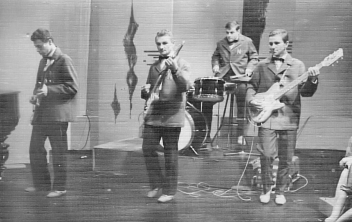 Grupa muzyczna "Nastolatki" podczas występu dla Telewizji Łódź